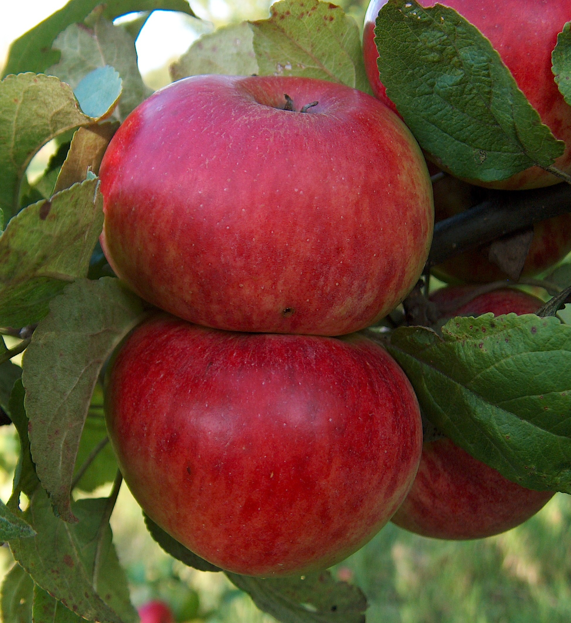 Apfelsorte Prinz Albrecht von Preussen